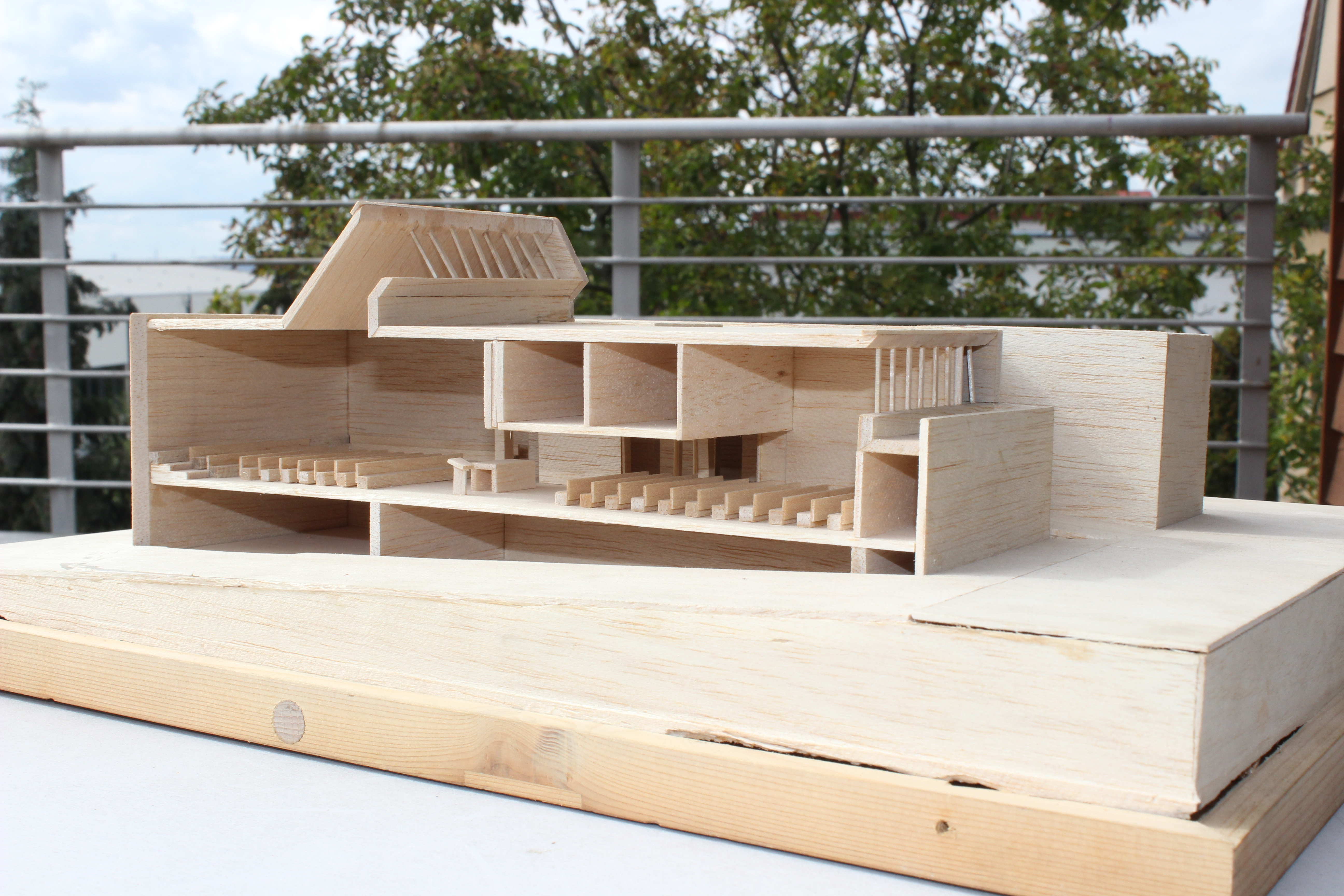 Model prvotního návrhu kostela v Praze 8 - Kobylisích od Ernsta Gisela.